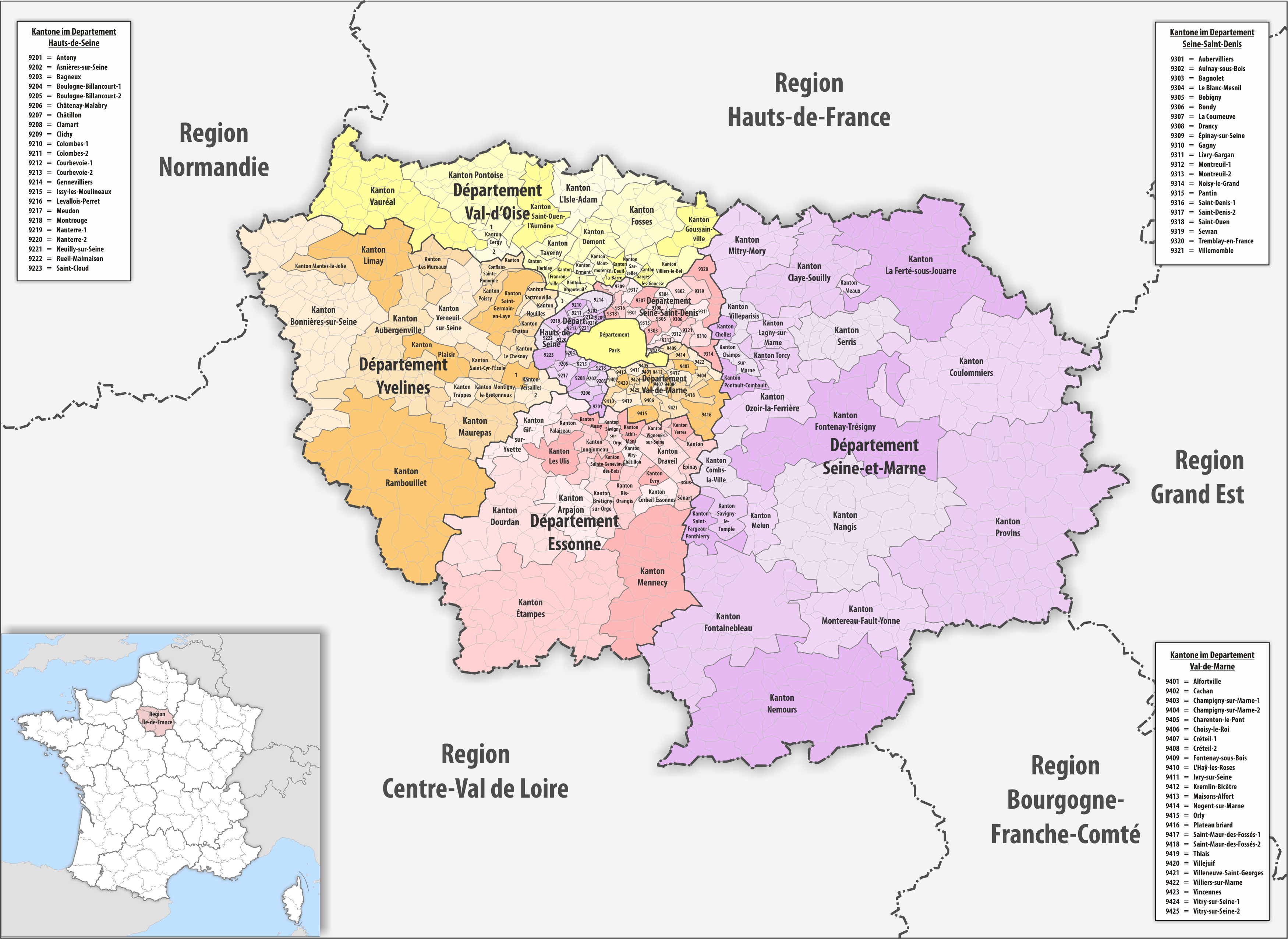 Gemeinden, Kantone und Departemente in der Region Île-de-France